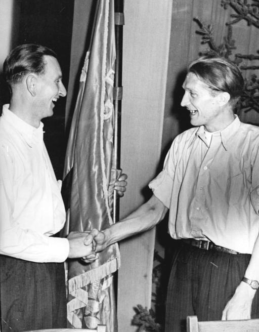 LPG Treppendorf, Ehrung mit Wanderfahne Im Beisein von Vertretern der demokratischen Parteien und Massenorganisationen sowie des Staatsapparates, der Vorsitzenden der Landwirtschaftlichen Produktionsgenossenschaften des Kreises Rudolstadt und der Delegation aus dem Patenbetrieb, Kunstfaserwerk "Wilhelm Pieck" Schwarza, erhielt der Vorsitzende der LPG Treppendorf, Bezirk Gera, Kreis Rudolstadt am 4. Juli aus den Händen des Genossen Neu vom Ministerium Land und Forst, Hauptabteilung LPG die Wanderfahne der DDR überreicht. Desweitere erhielt die LPG für den erfolgreichen Abschluss des genossenschaftlichen Wettbewerbes in der Frühjahrsbestellung 5000 DM überreicht. Der Vorsitzende der LPG Treppendorf, die sich an diesem historischenTage den verpflichtenden Namen "Wilhelm Pieck" gab, Rudi Jahn, gab im Namen aller Genossenschaftsmitglieder die Erklärung ab, dass sie alles tun werden, damit nach dem erfolgreichen Abschluss der Ernte weiterhin die Wanderfahne über der LPG Treppendorf weht. Bis zum 25. August wollen die Mitglieder der LPG das Getreide an den Staat abgeliefert haben.